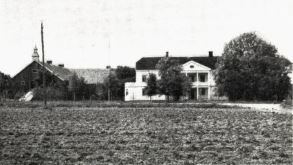 Medbroen (Medbrua) (gnr. 85, bnr. 1) i Stjørdal. Reprofoto.